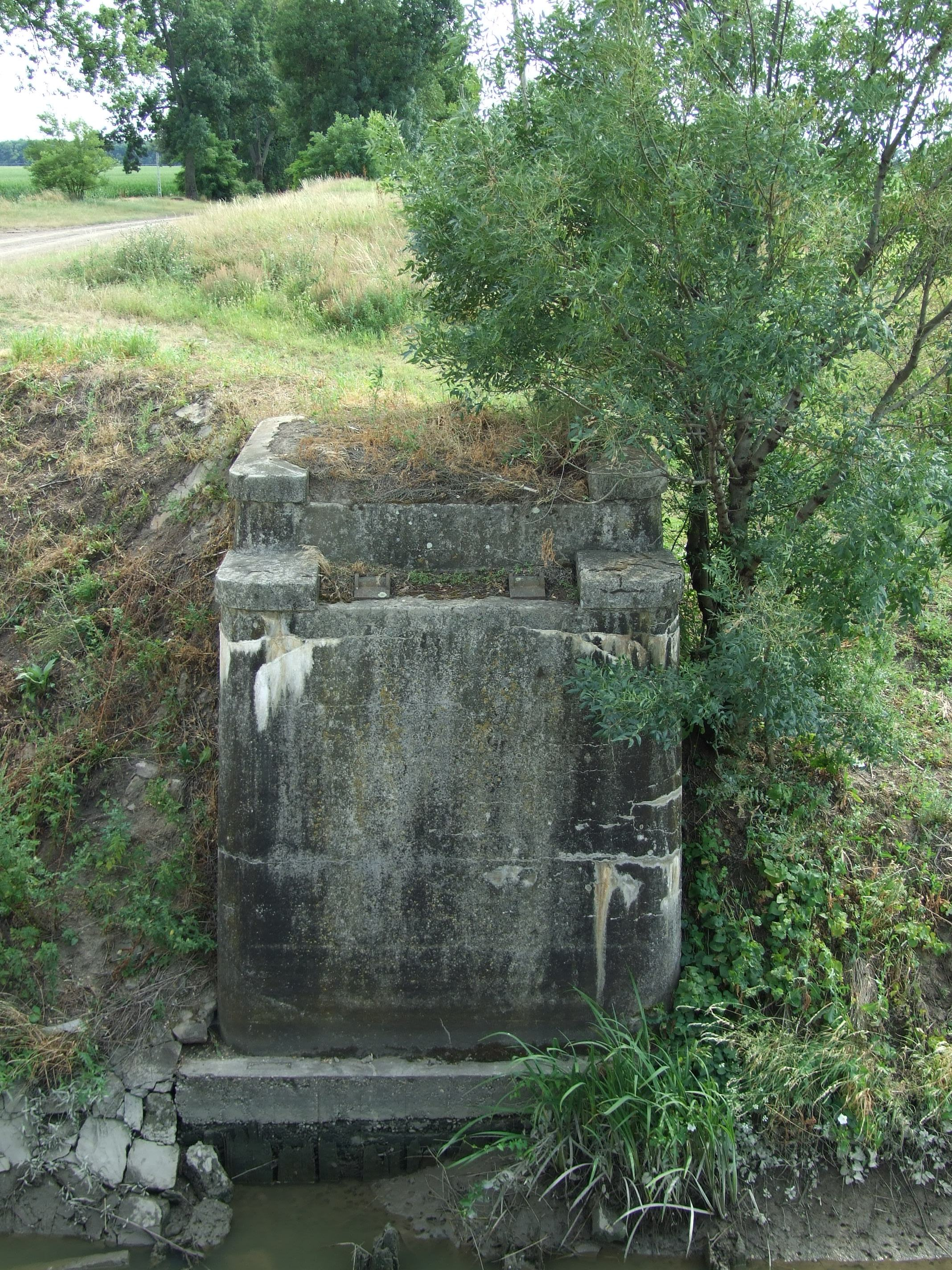 A vilmosmajori vonal Élővíz-csatorna hídjának maradványa Mezőhegyesnél (Mezőhegyesi Gazdasági Vasút)